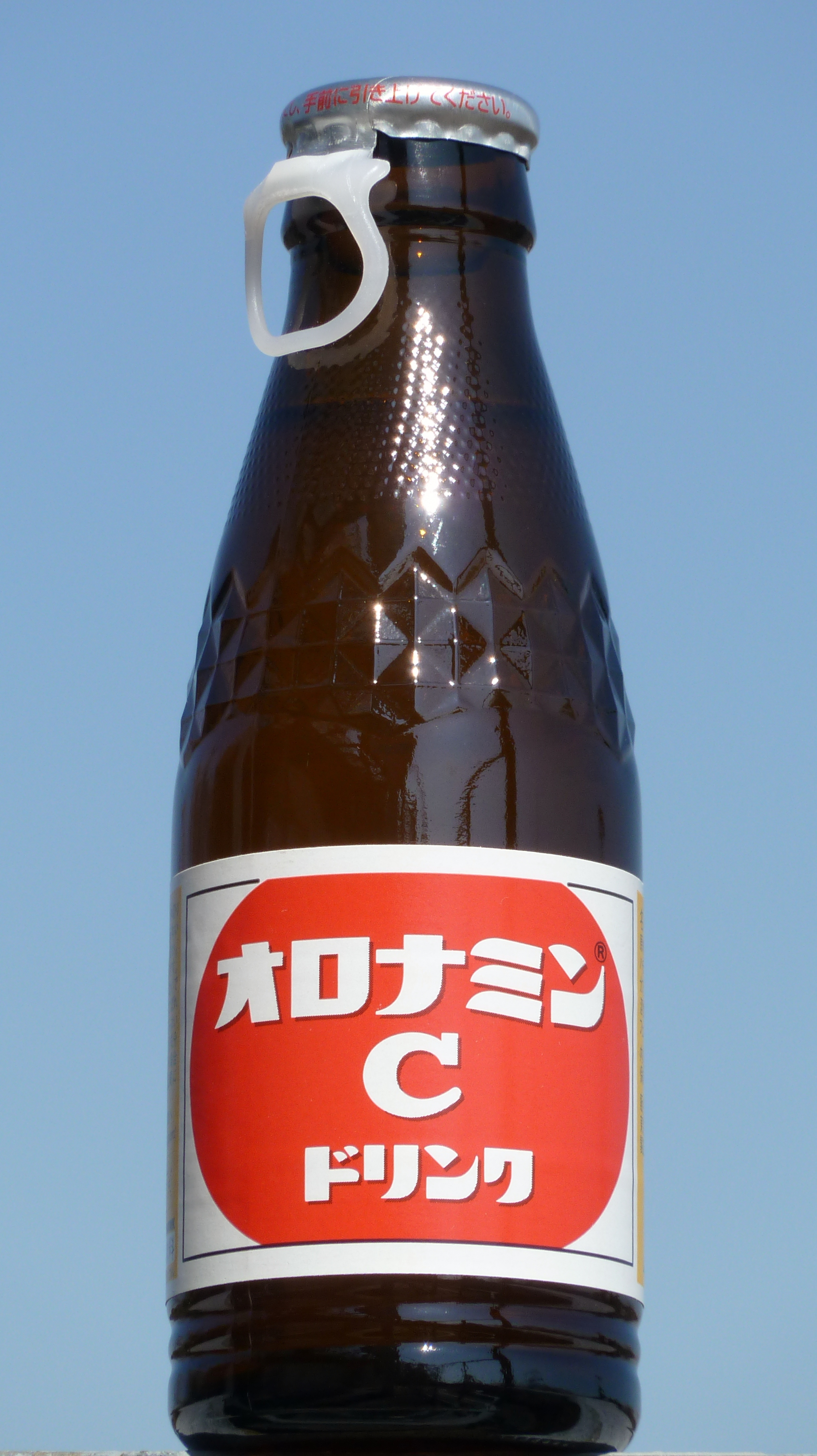 大塚製薬が販売する炭酸飲料「オロナミンCドリンク」。日本国内で販売されている商品。